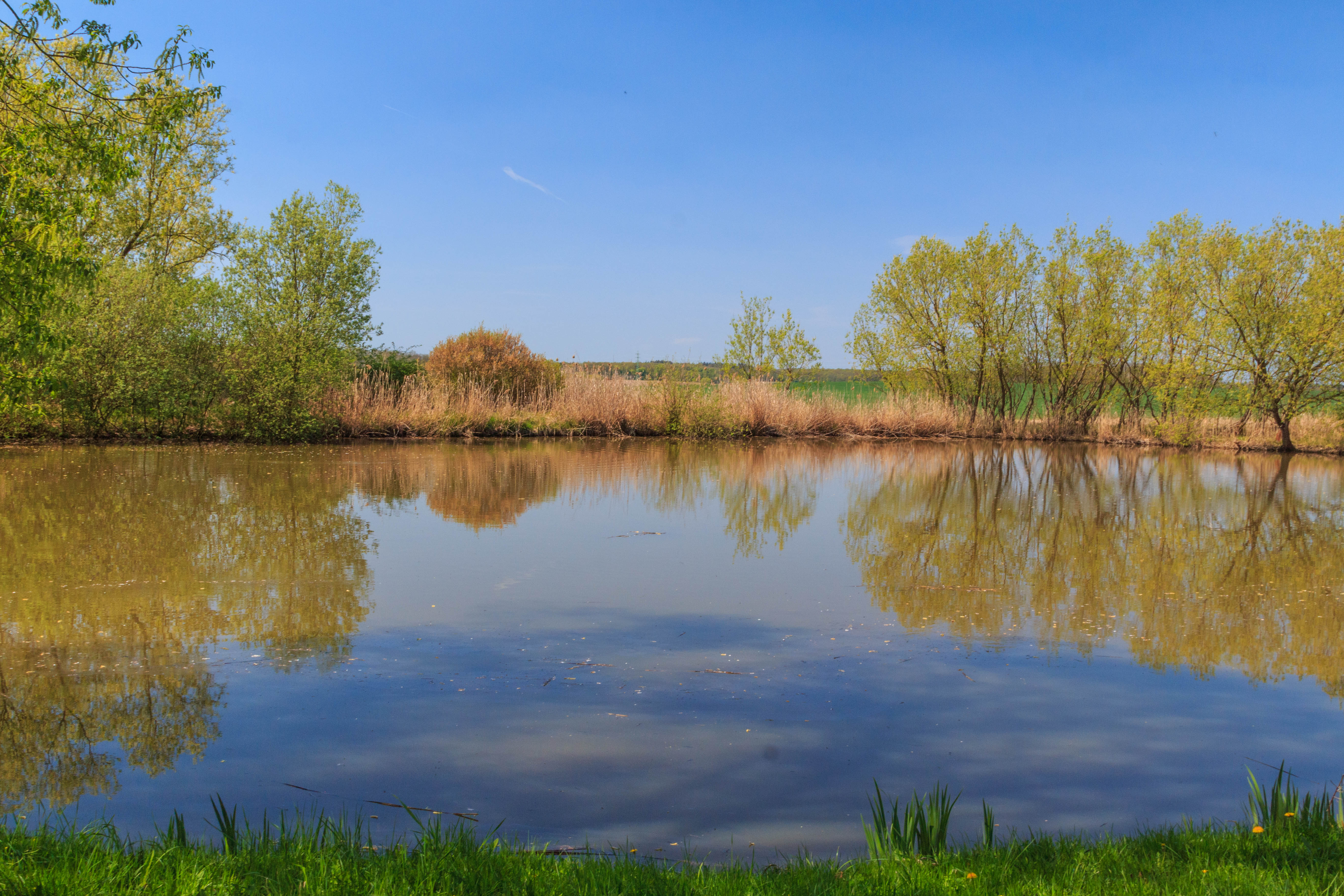 Rybníček u lesa Svídník u Chmelovic Project: Vodstvo.